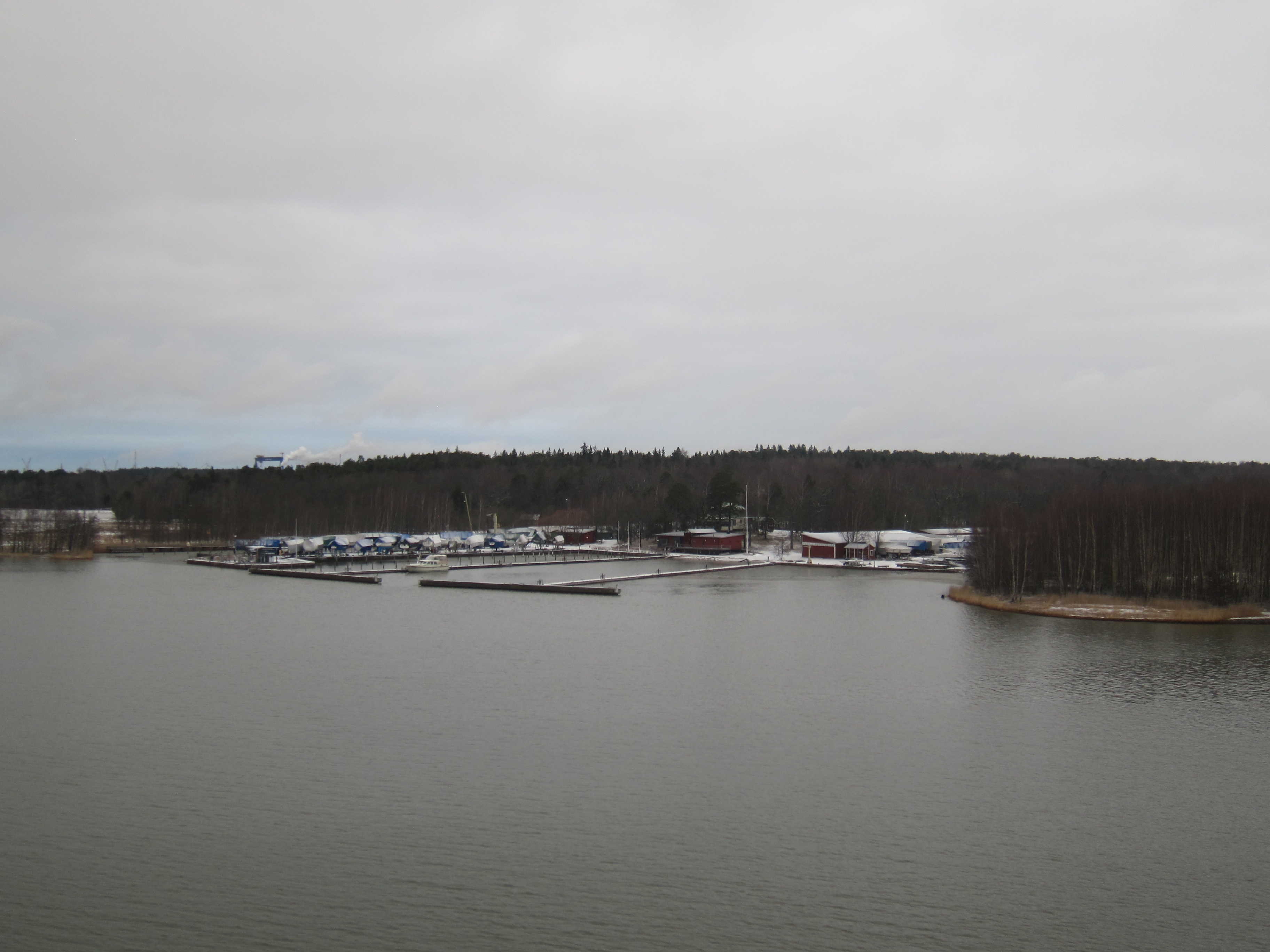 Turun Pursiseuran Ruissalon vierasvenesatama ruotsinlaivalta kuvattuna talvella 2015. Kuva on otettu Pikku-Pukin suunnasta.